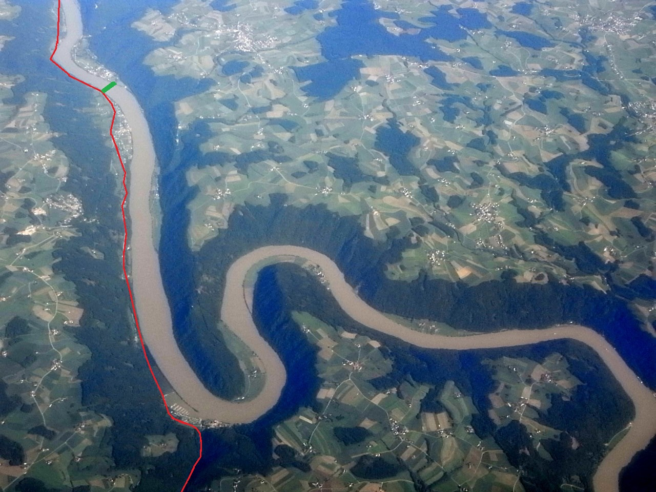 Verlauf (rot) der Nibelungen Straße B 130 an der Schlögener Schlinge in Österreich (Luftbild 2010)